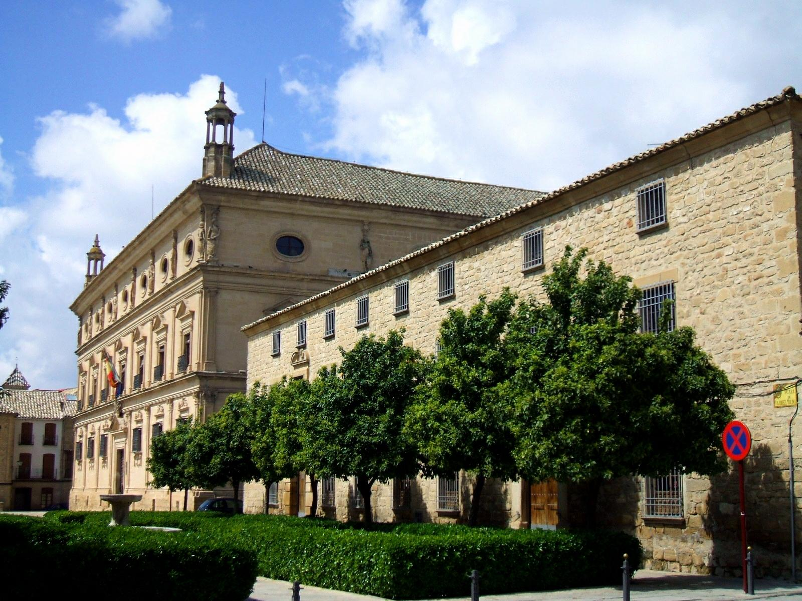 Antigua cárcel de Úbeda